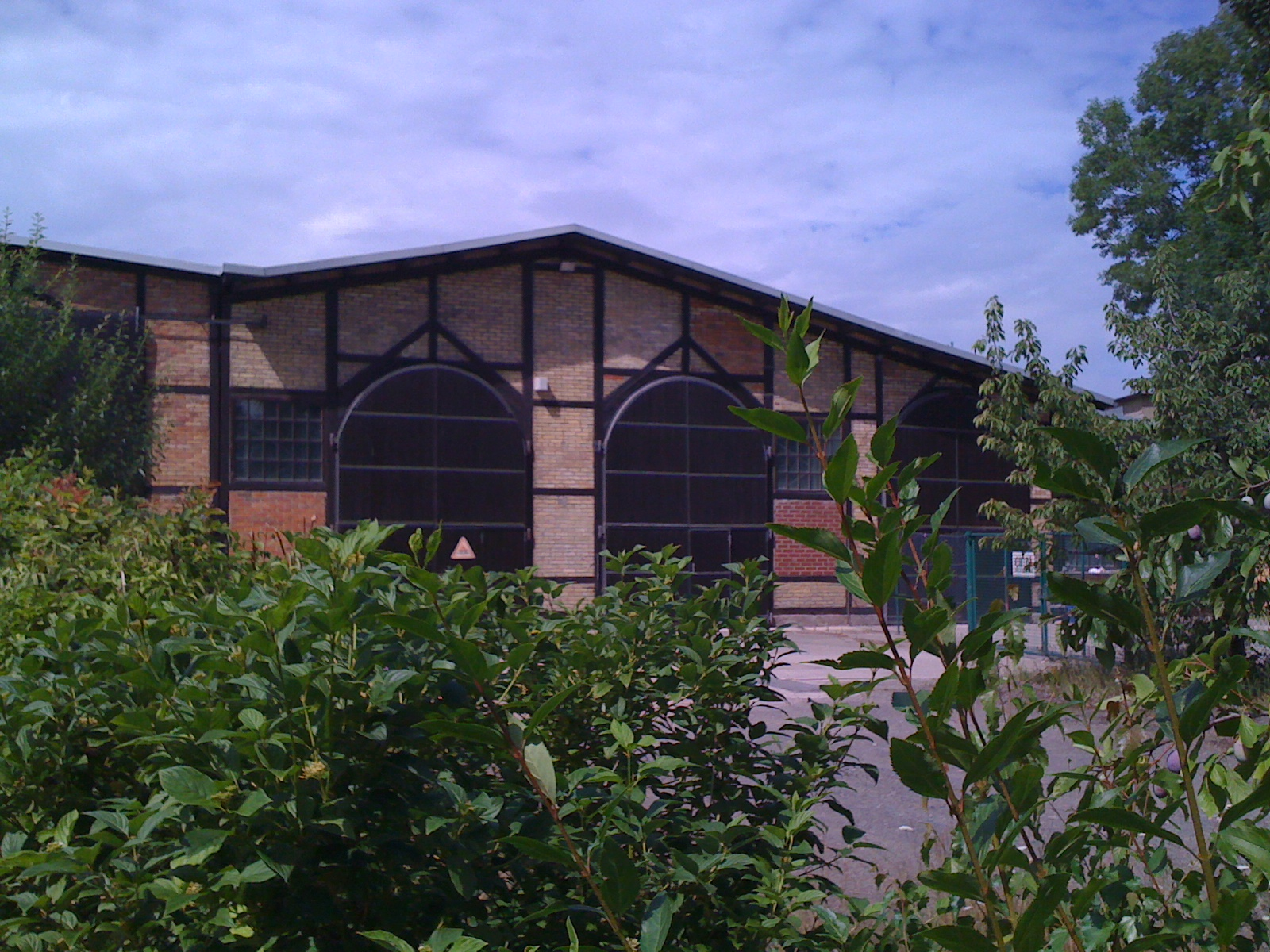 Ehemaliger Lokschuppen der Hafenbahn Halle